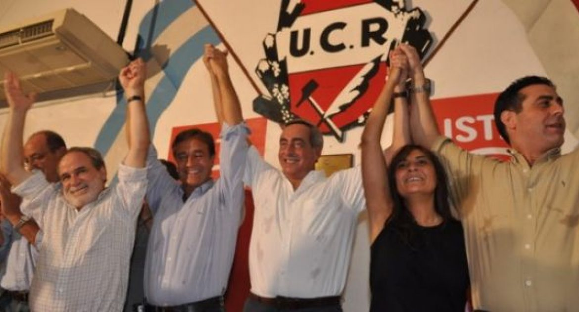 Víctor Fayad, intendente de la ciudad de Mendoza (2007-2014) celebra la victoria de su partido, la Unión Cívica Radical, en las elecciones desdobladas de concejales de 2010. A su lado, Rodolfo Suárez, quien posteriormente sería intendente (2014-2019) y gobernador de Mendoza (2019-2023), encabezó la lista radical en los comicios.